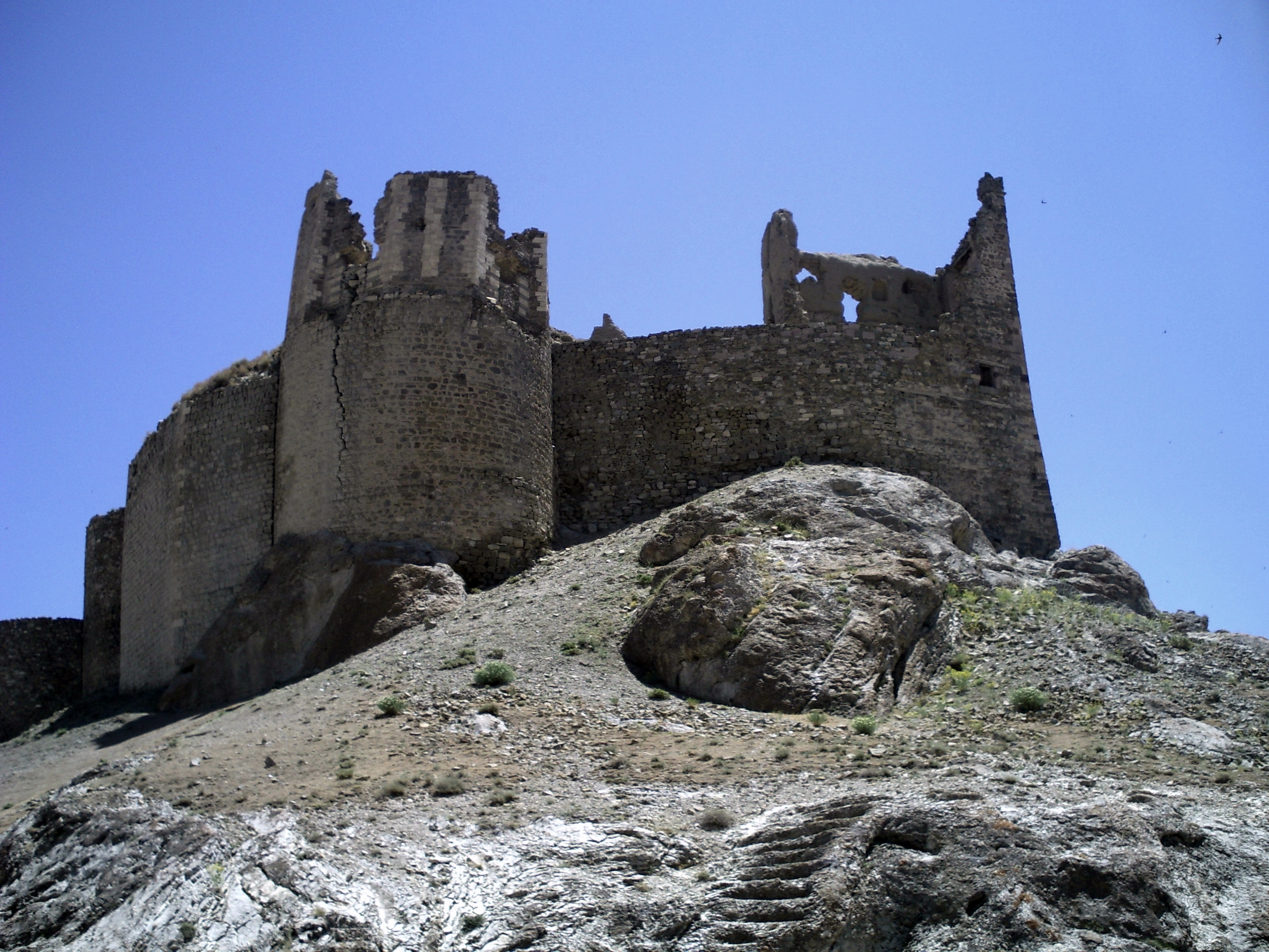 Hoşap Kalesi (Van, Türkiye)